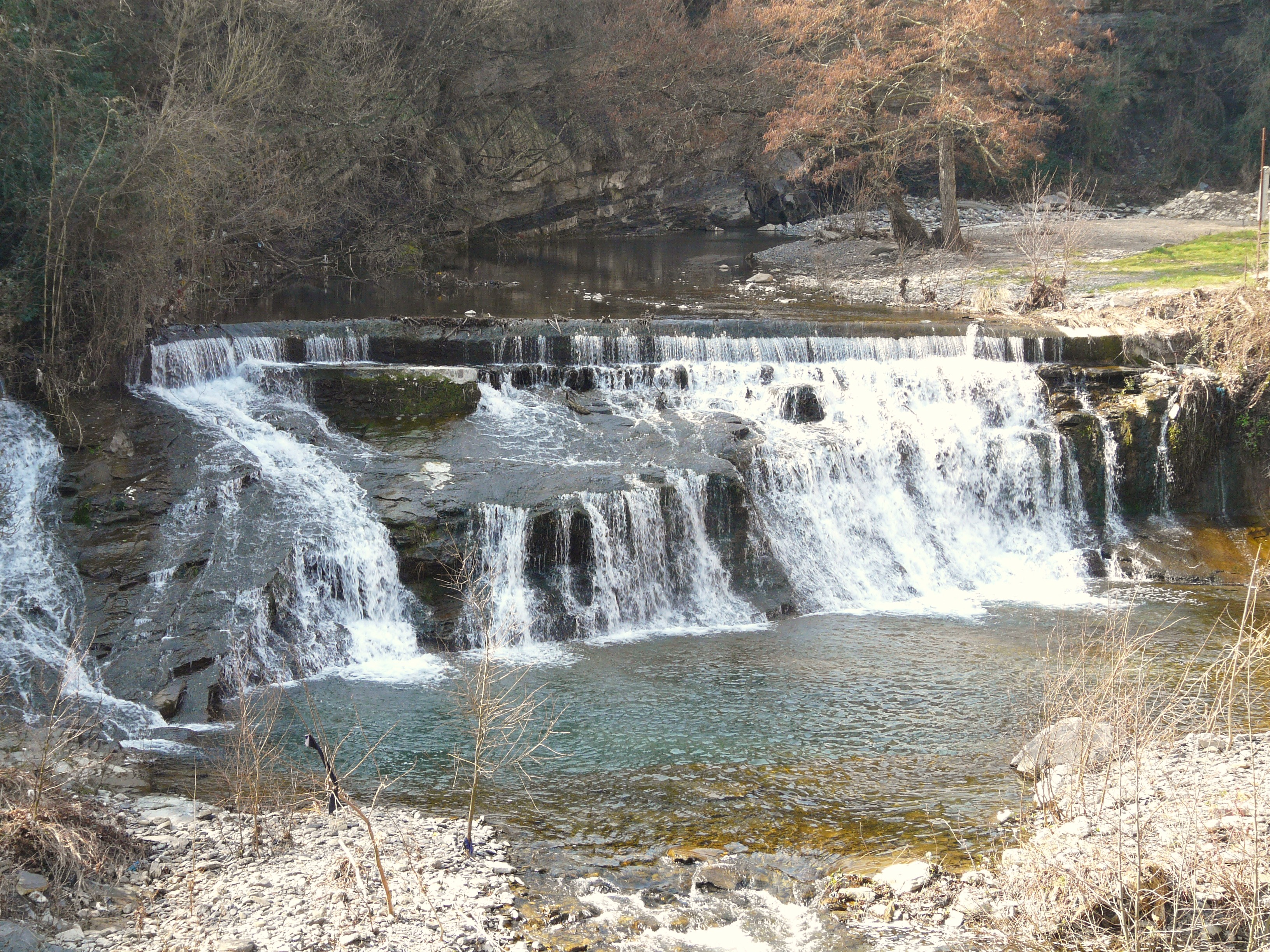 Maro, Borgomaro, Liguria, Italia